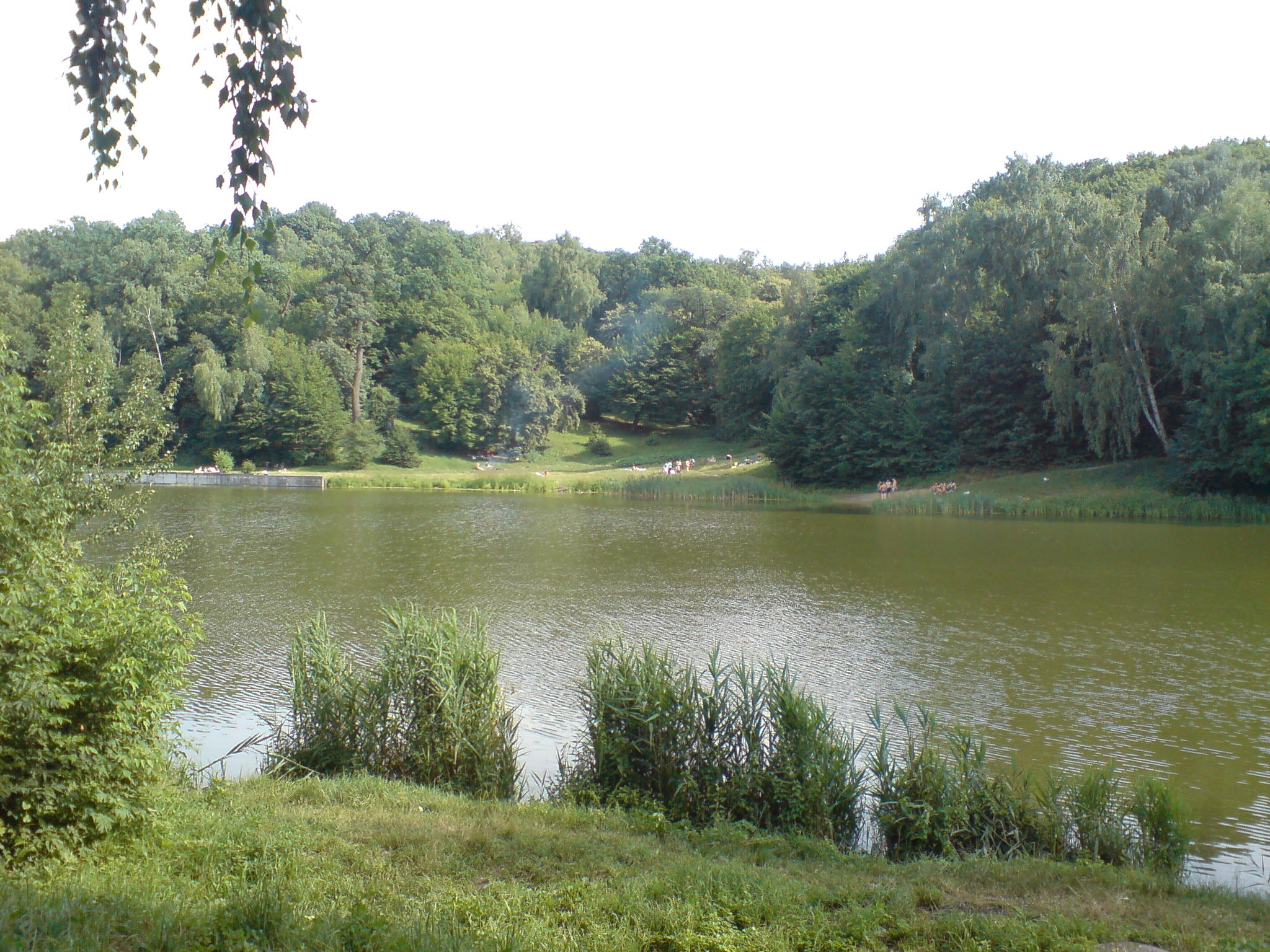 Kiev. Golosiivsky forest. Didorivka lake